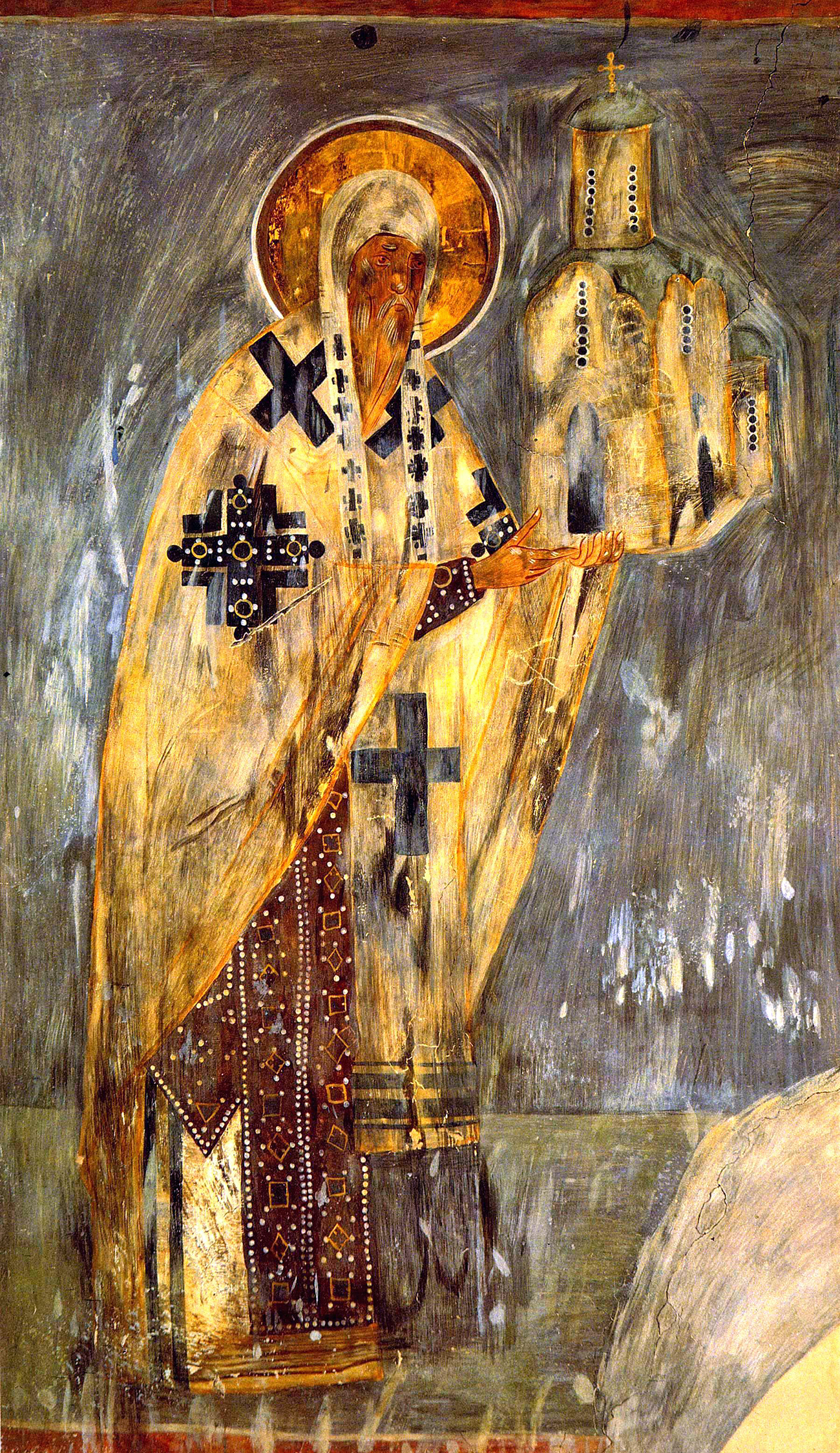 Святитель Моисей, Архиепископ Новгородский. Копия фрески церкви Успения на Волотовом поле в Новгороде.